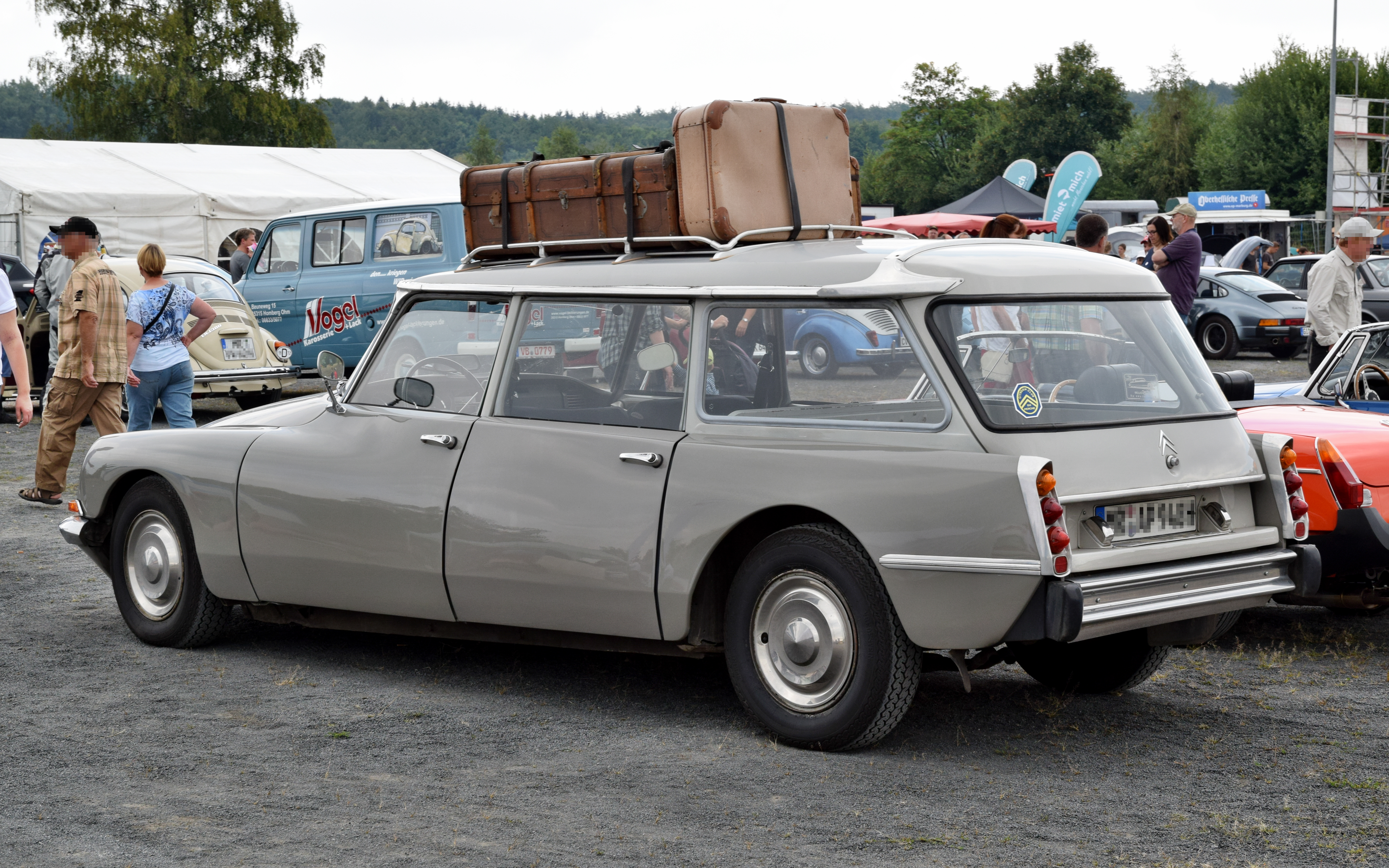 Citroën DS Break auf dem 5. "Werk II Old- und Youngtimertreffen" 2016 in Dreihausen